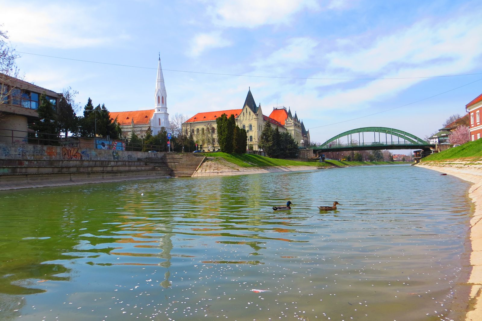 Zrenjanin, Serbia